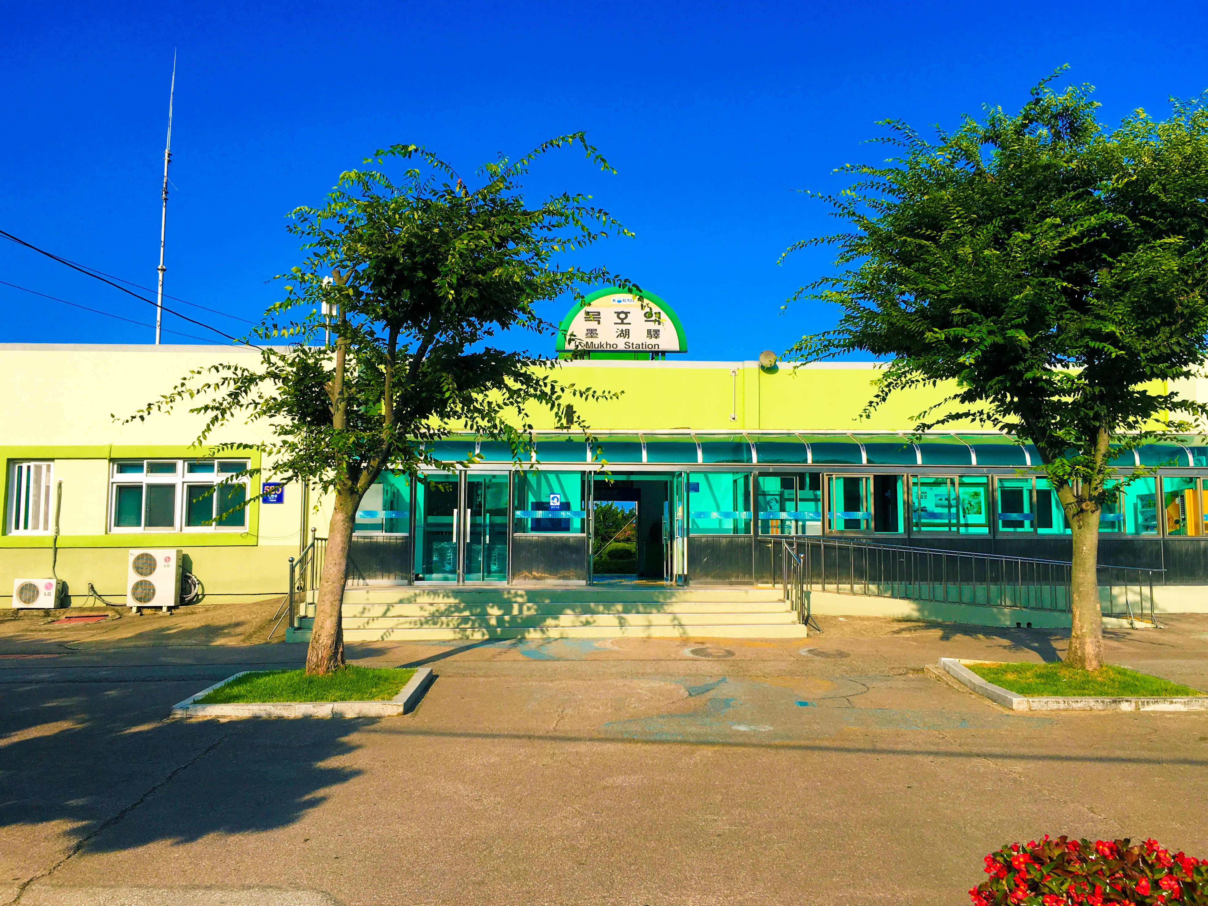 묵호역 역사